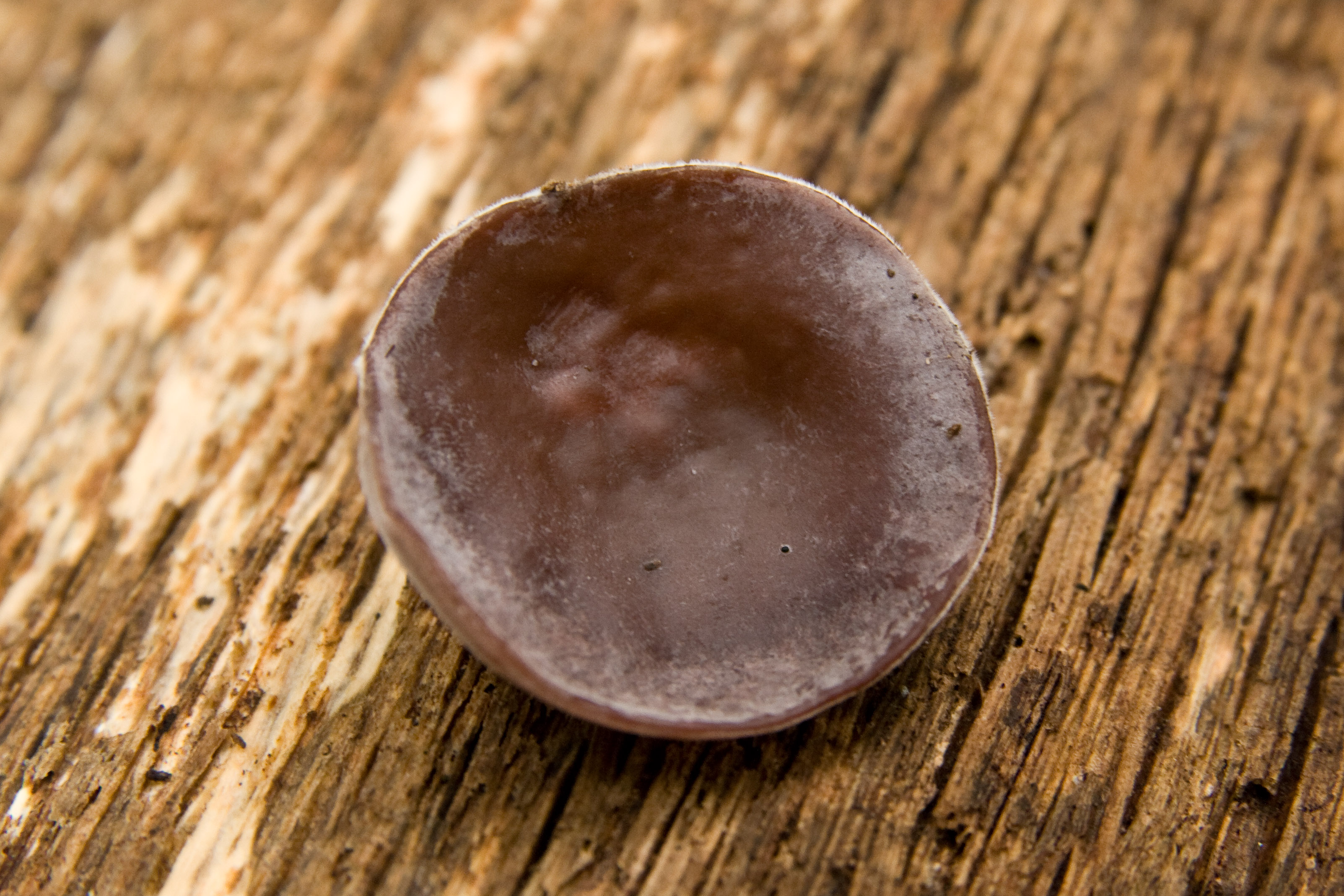 アラゲキクラゲ (学名:Auricularia polytricha)